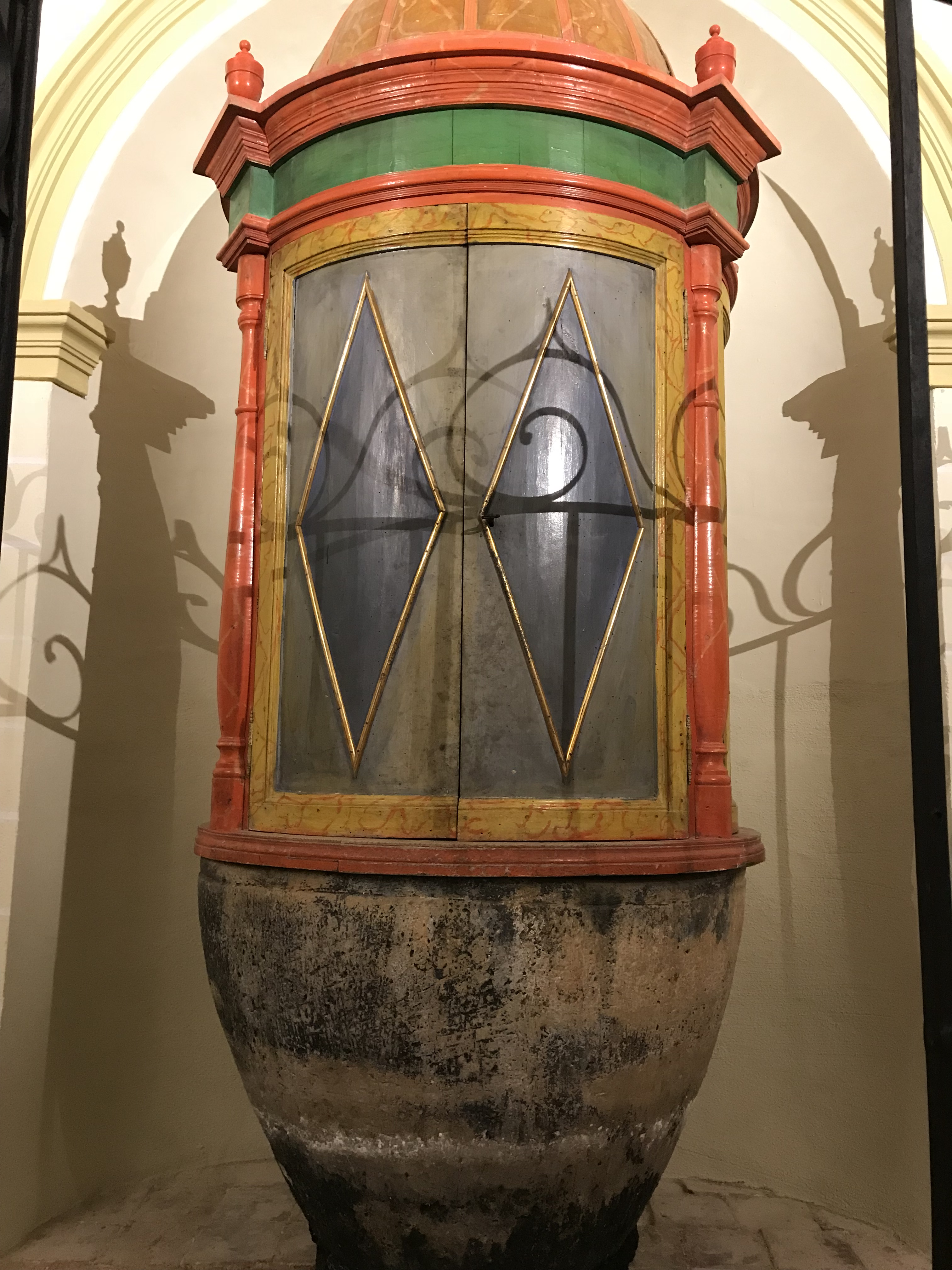 las cuerlas